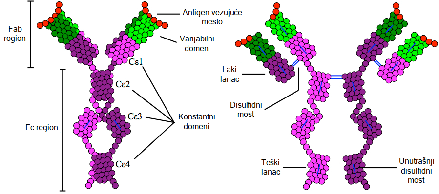 Struktura imunoglobulina E